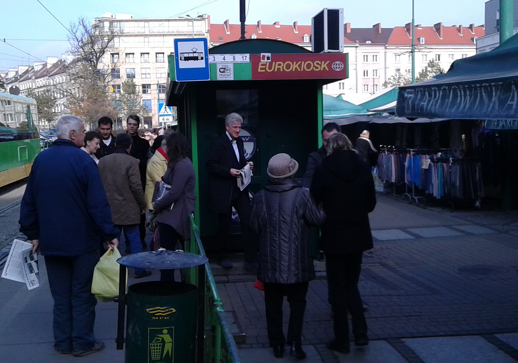 Kandydaci komitetu Teraz Wielkopolska agitują w trakcie kampanii wyborczej przed wyborami samorządowymi w 2014 r. na Rynku Bernardyńskim w Poznaniu. W środku Ryszard Grobelny.